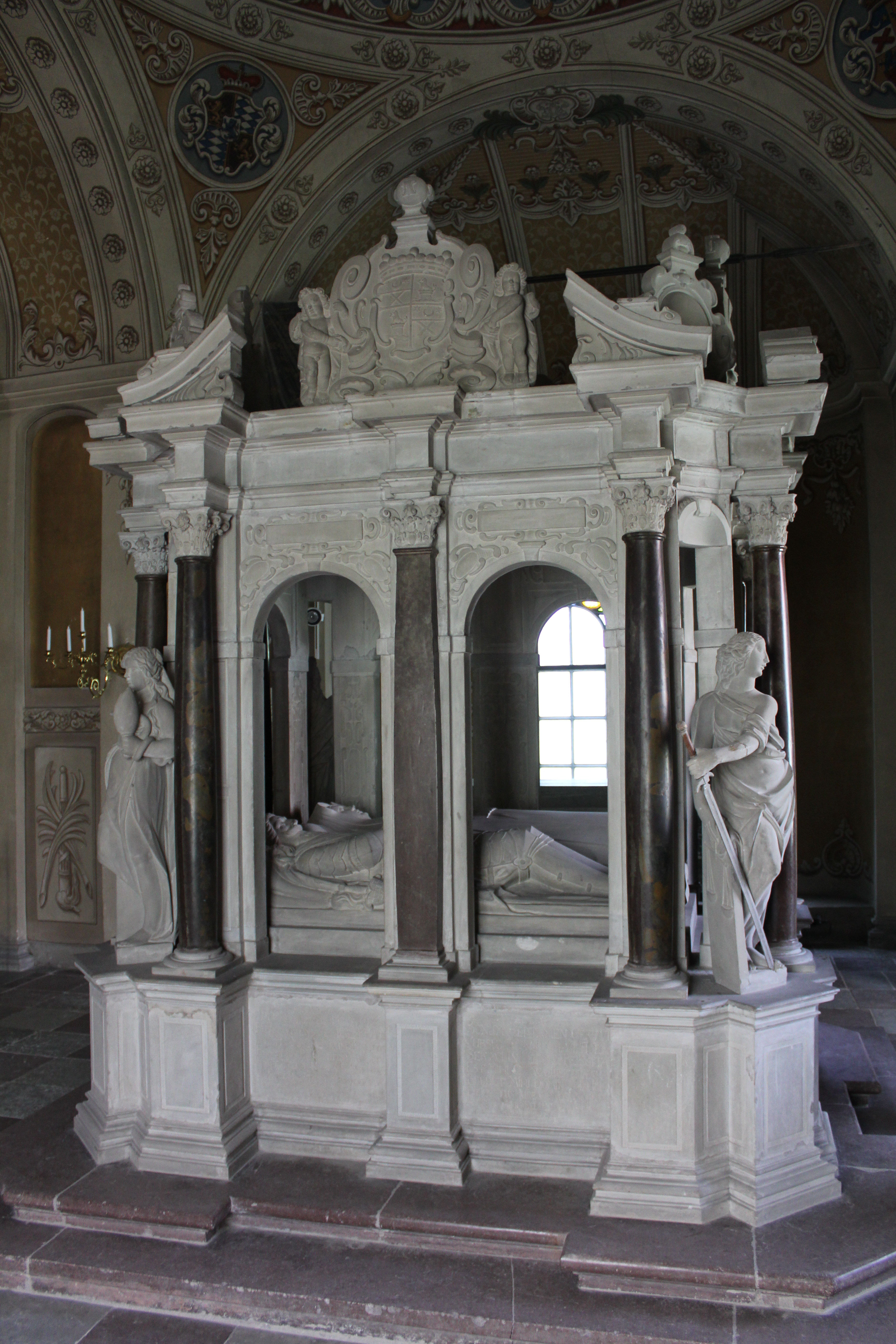 Gravmonument över Johan de la Gardie och hustrun Catharina Oxenstierna, Veckholms kyrka, Enköpings kommun.